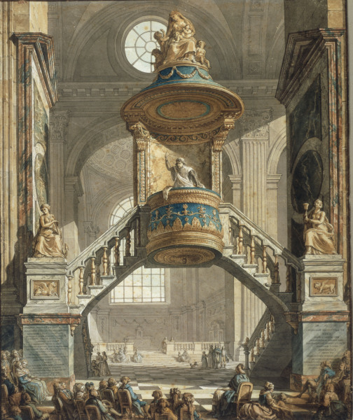 Werk von Charles De Wailly